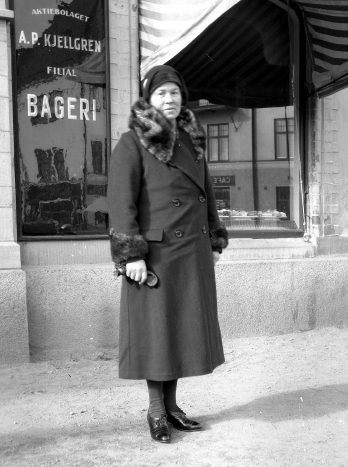 Kerstin Hed (1890-1961) stående utanför A.P Kjellgrens bageri